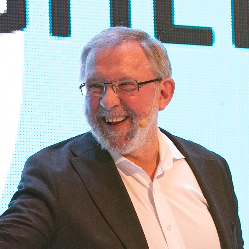 Else Kåss Furuseth og Harald Stanghelle.